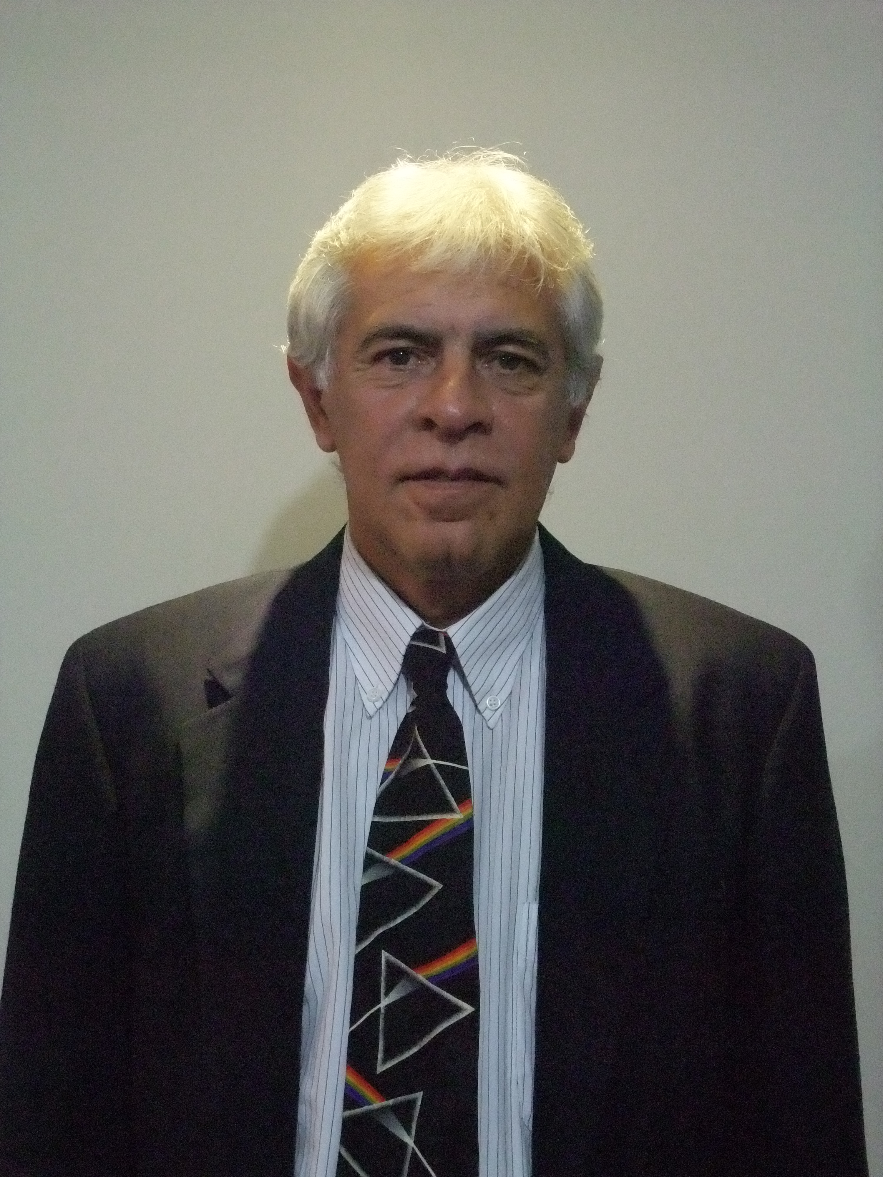 Foto de Jorge Omar Speranza Meas